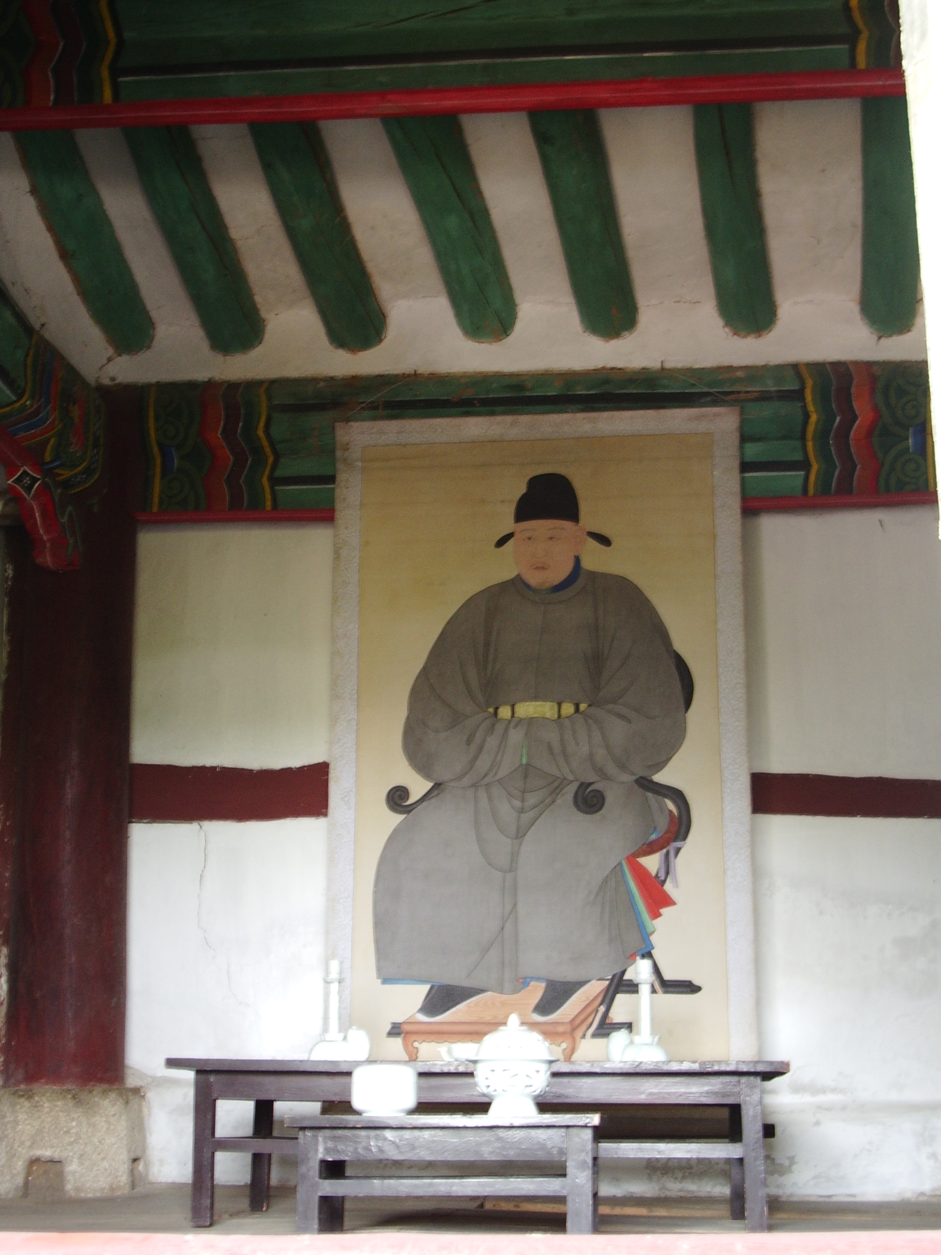 정몽주 초상화